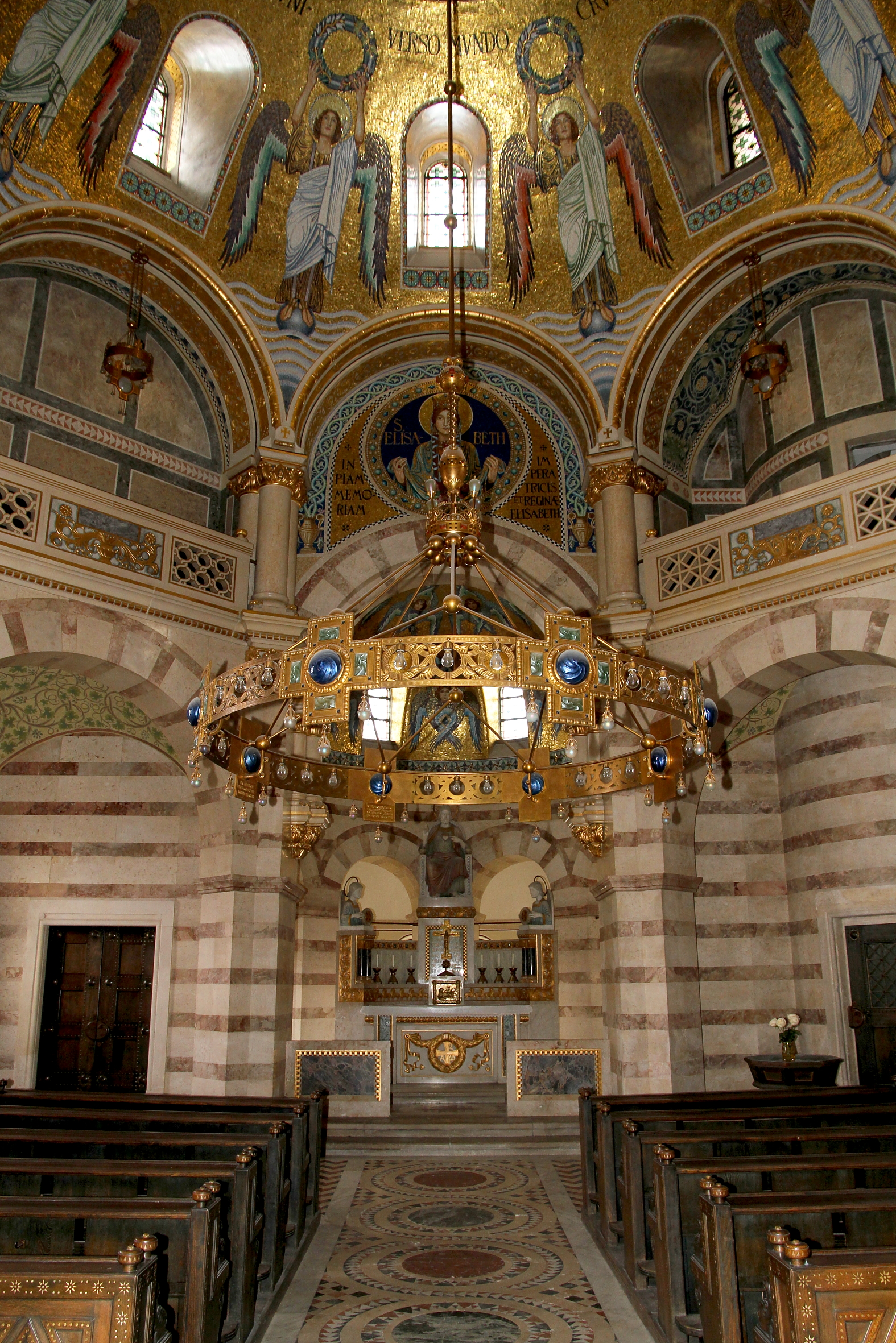 Die Elisabethkapelle in der Mexikokirche im 2. Wiener Gemeindebezirk Leopoldstadt. Die Jugendstilkapelle wurde in memoriam der Kaiserin Elisabeth vom Roten Kreuz finanziert, 1907 fertiggestellt und am 10. Juni 1908 feierlich geweiht.